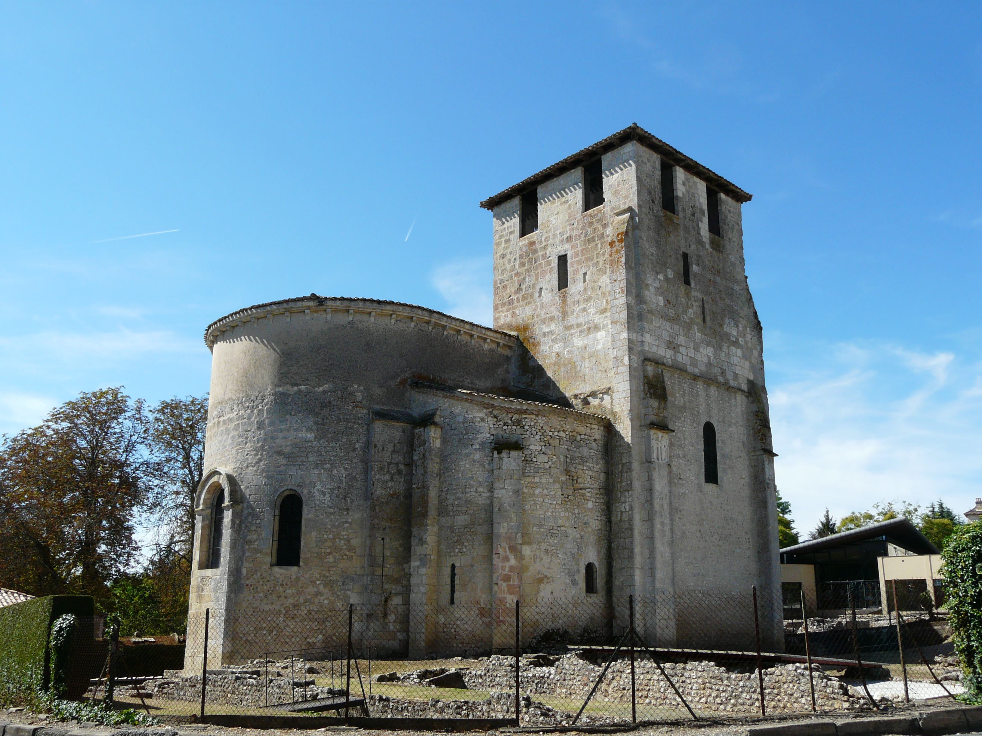 L'église Saint-Pierre-ès-Liens entourée des ruines gallo-romaines, Montcaret, Dordogne, France.